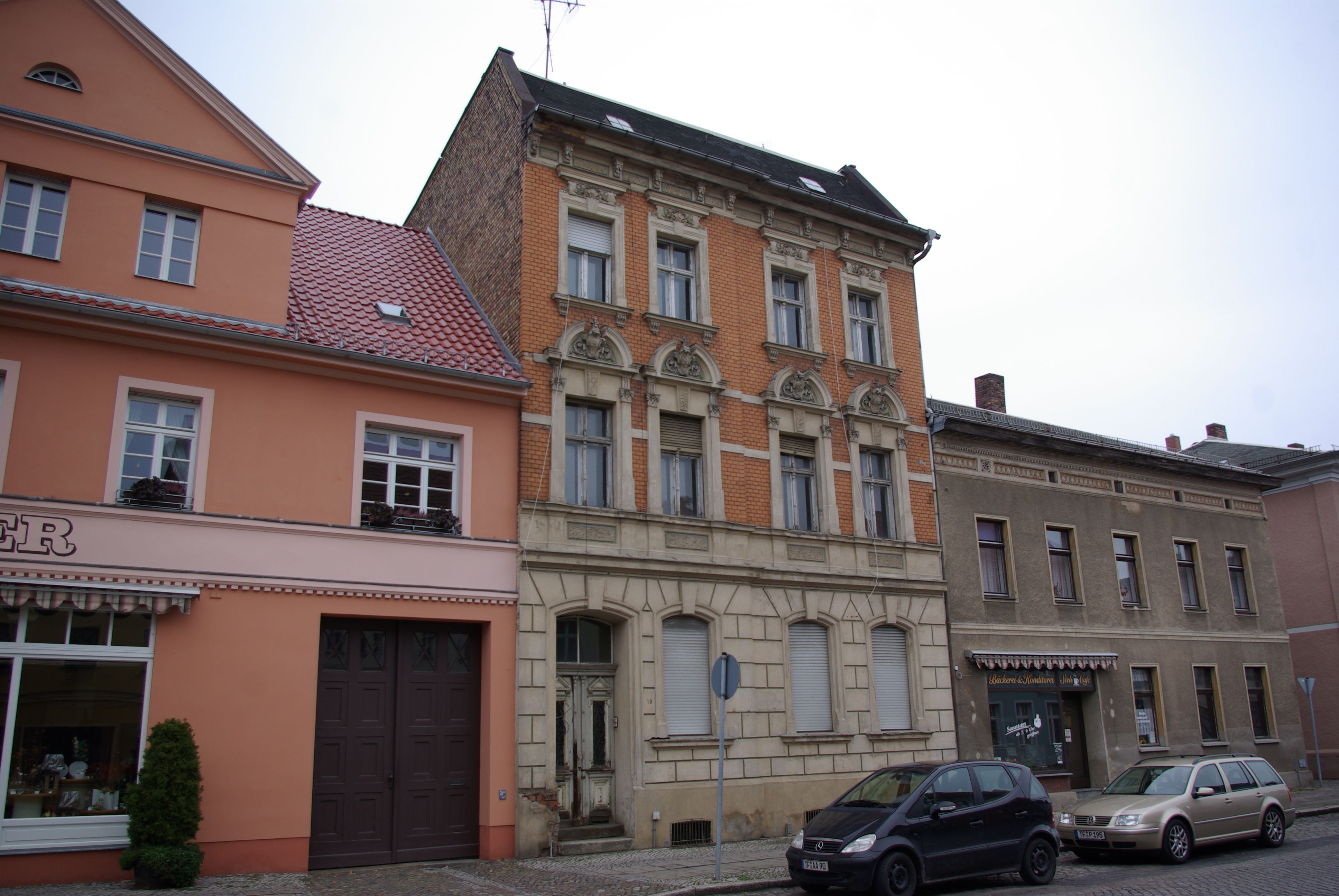 Jüterbog in Brandenburg. Das Haus in der Pferdestraße 19 steht unter Denkmalschutz. Das schmale Haus wurde 1900 erbaut.